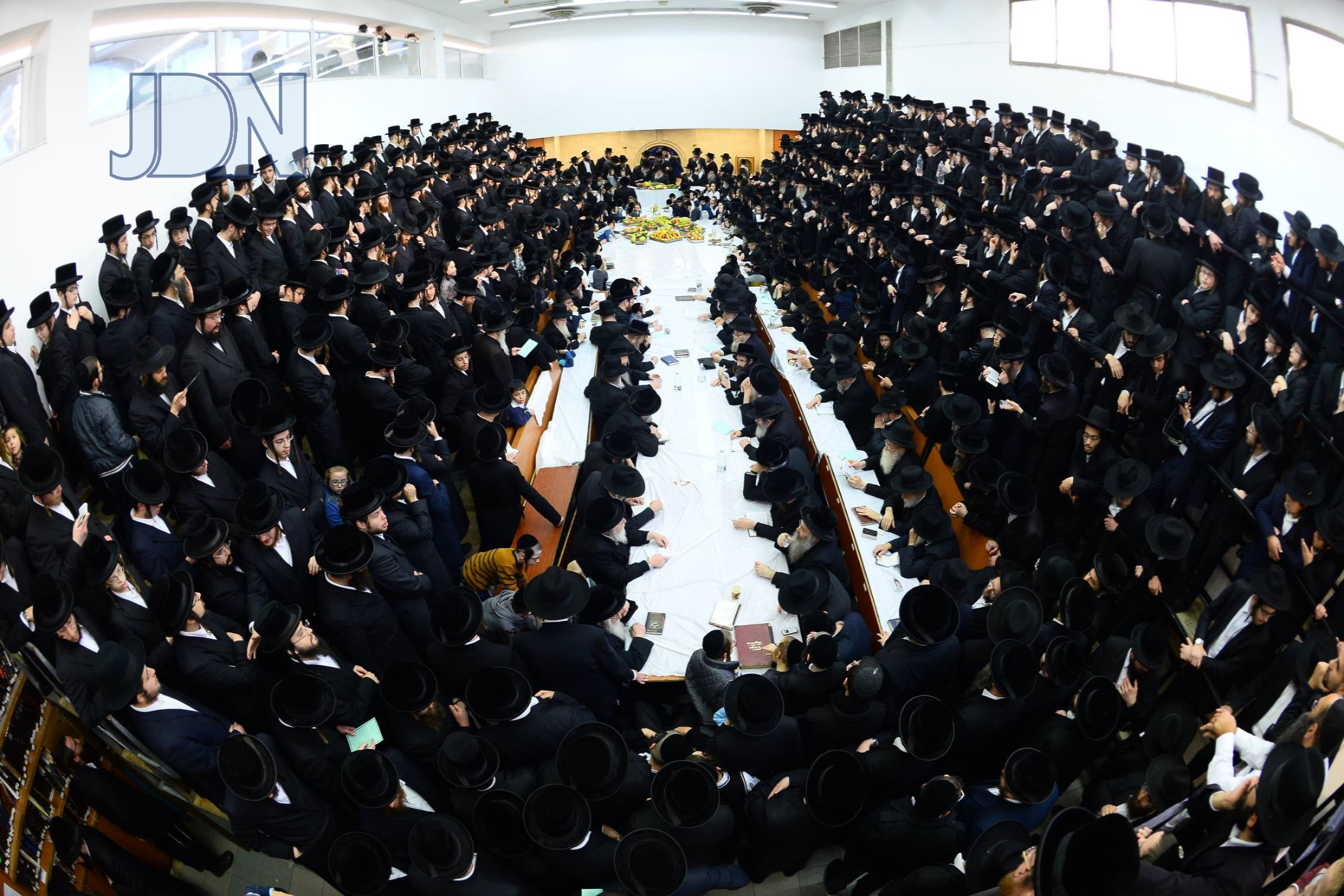 טיש בחסידות נדבורנה